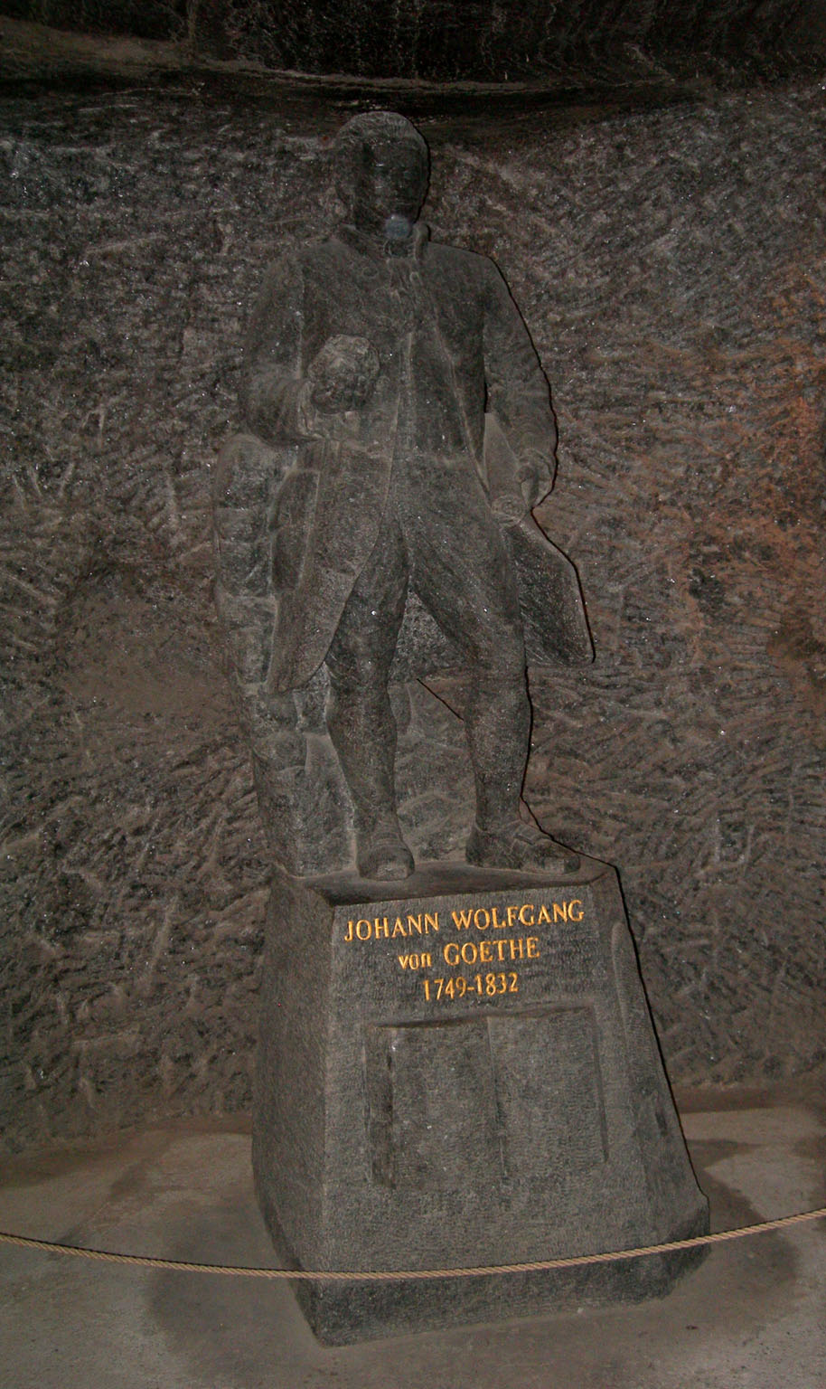 Rzeźba przedstawiająca Johanna Wolfganga von Goethe w komorze Maria Teresa II w kopalni soli w Wieliczce.